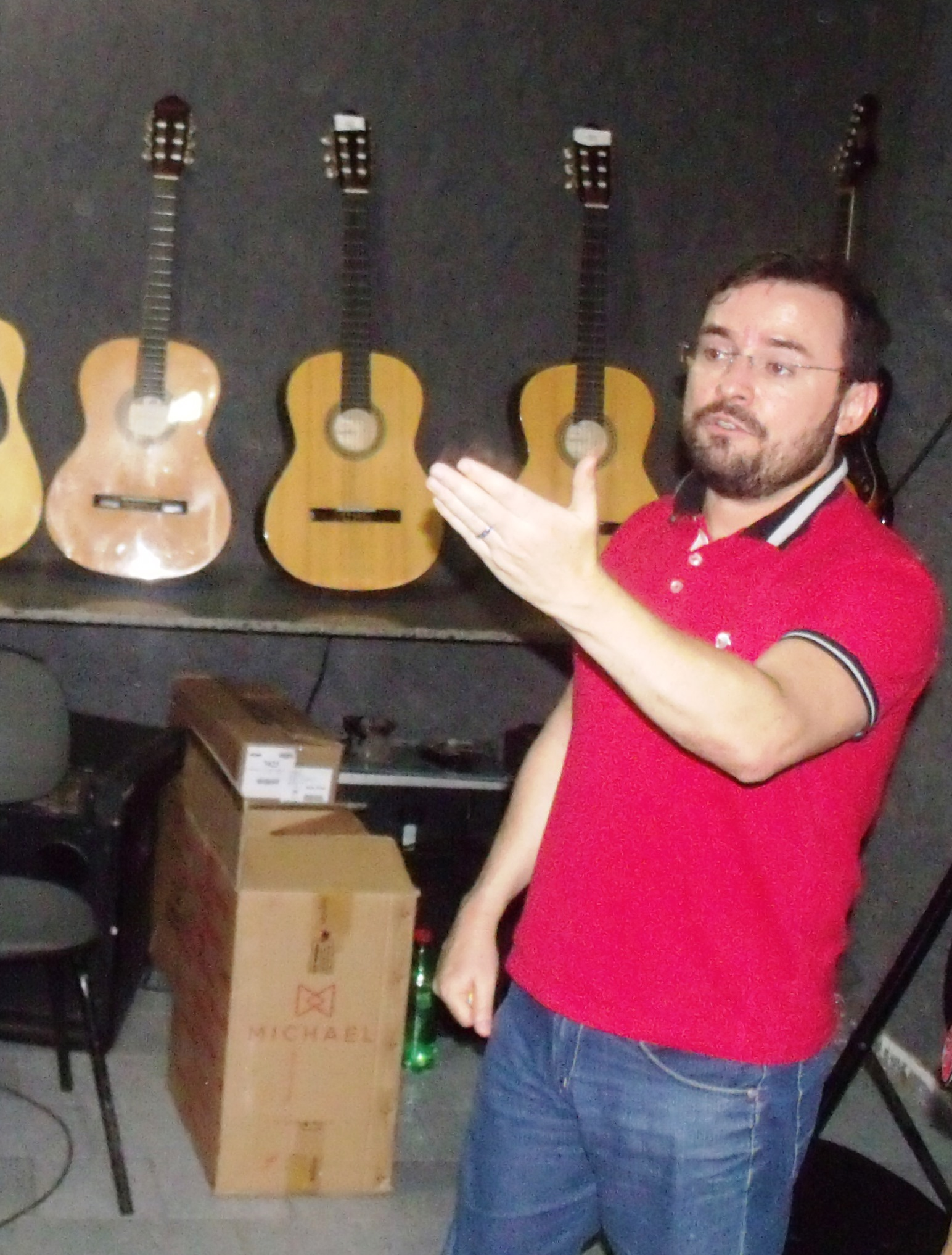 Imagem de Fábio Núñez Novo secretário estadual de cultura do Piauí.